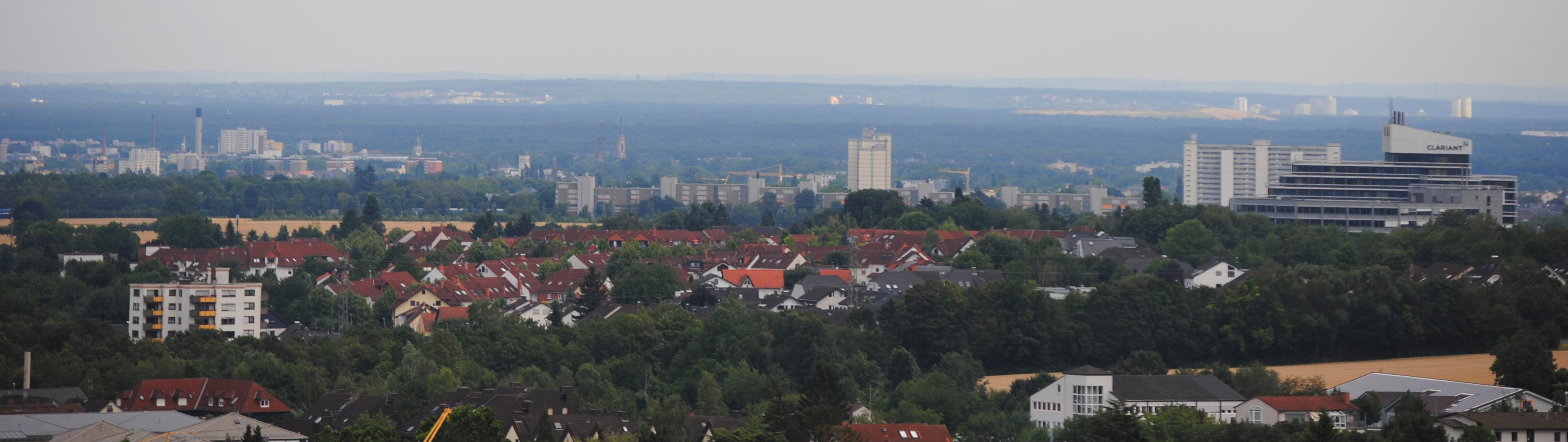 Blick vom Burgbergturm in Bad Soden am Taunus auf Sulzbach (Taunus)